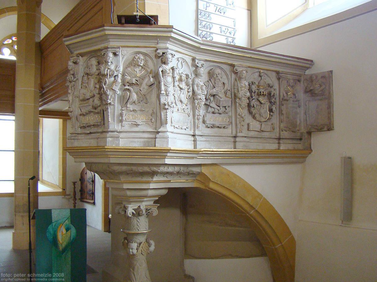 Kanzel der Stadtkirche St. Salvator in Neckarbischofsheim von Jakob Müller (siehe Peter Beisel: Jakob Müller. Ein Bildhauer und Baumeister, der Neckarbischofsheim geprägt hat. In: Kraichgau. Beiträge zur Landschafts- und Heimatforschung, Folge 18/2003, S. 123−130, Hrsg. vom Heimatverein Kraichgau, Eppingen 2003, ISBN 3-921214-28-9)